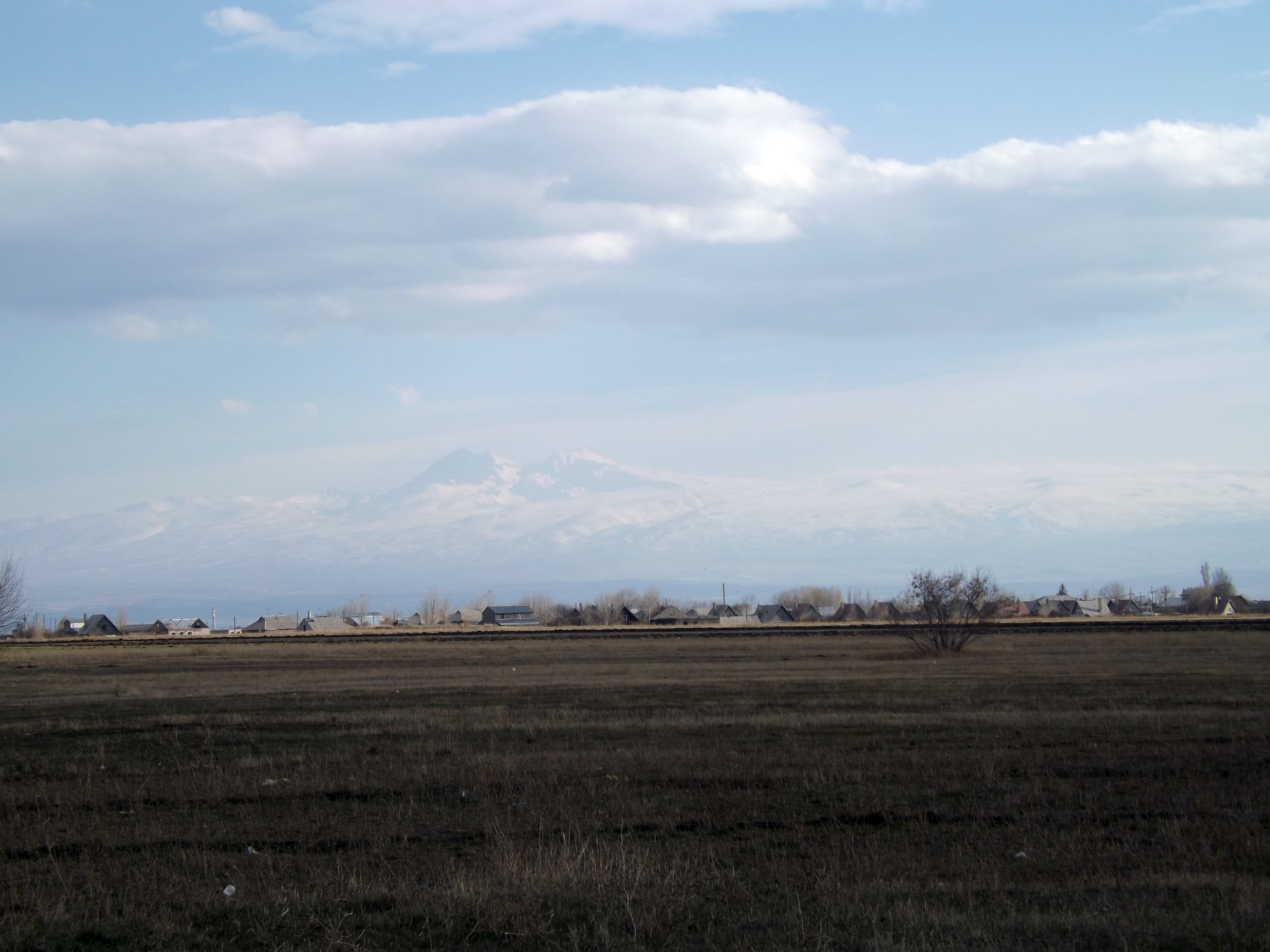 panorama de village Marmashen et le montagne Aragats